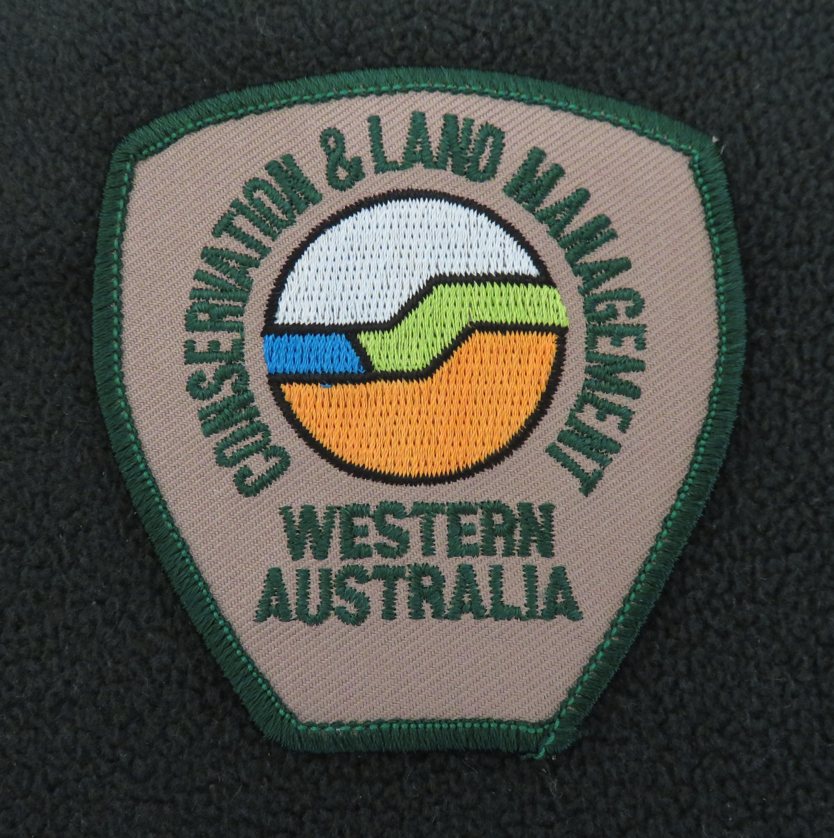 Generic (Western Australia) shoulder patch for Western Australia Department of Conservation and Land Management staff uniform in 2005.